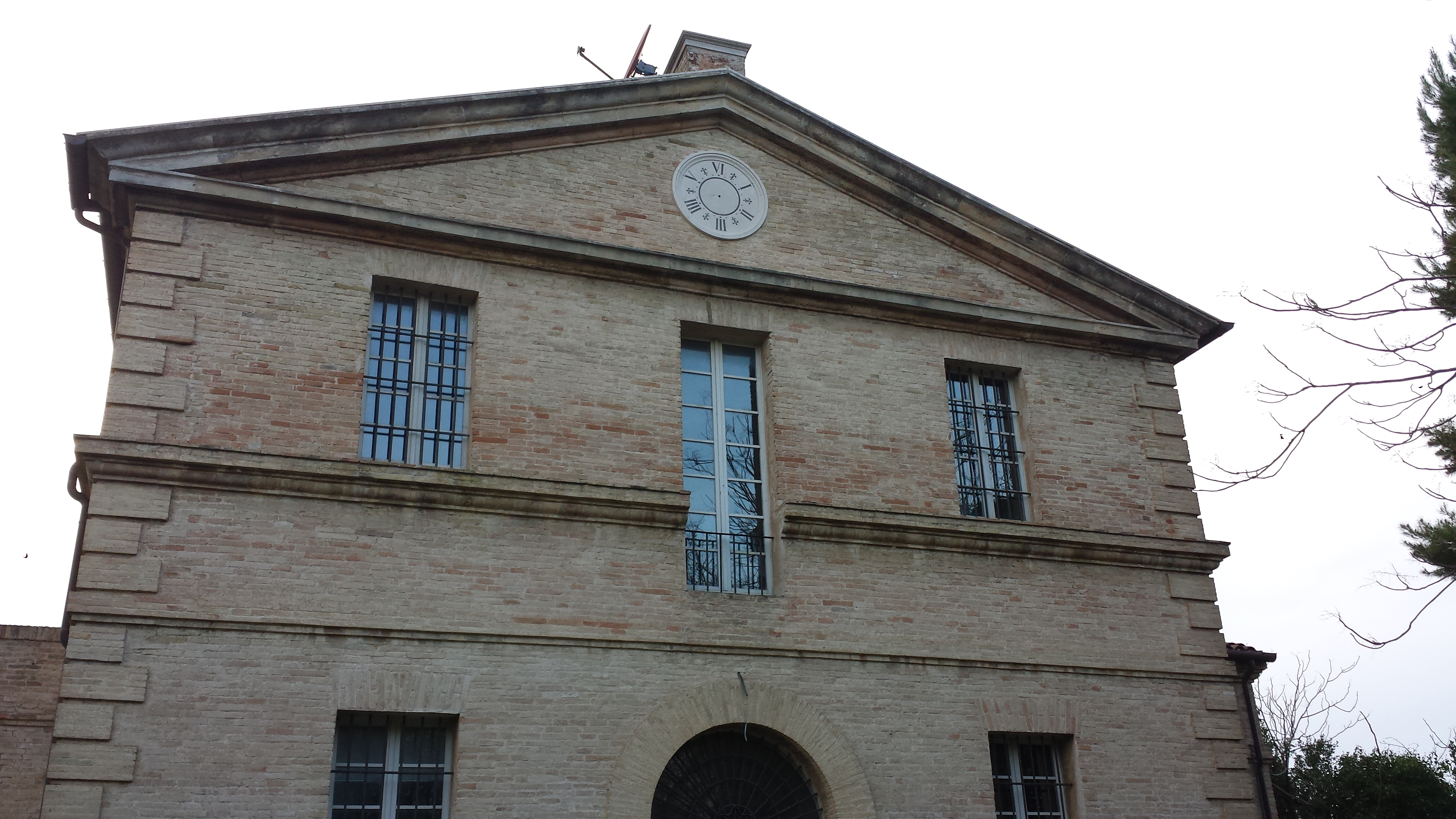 Esterno della stalla di Villa Favorita ad Ancona